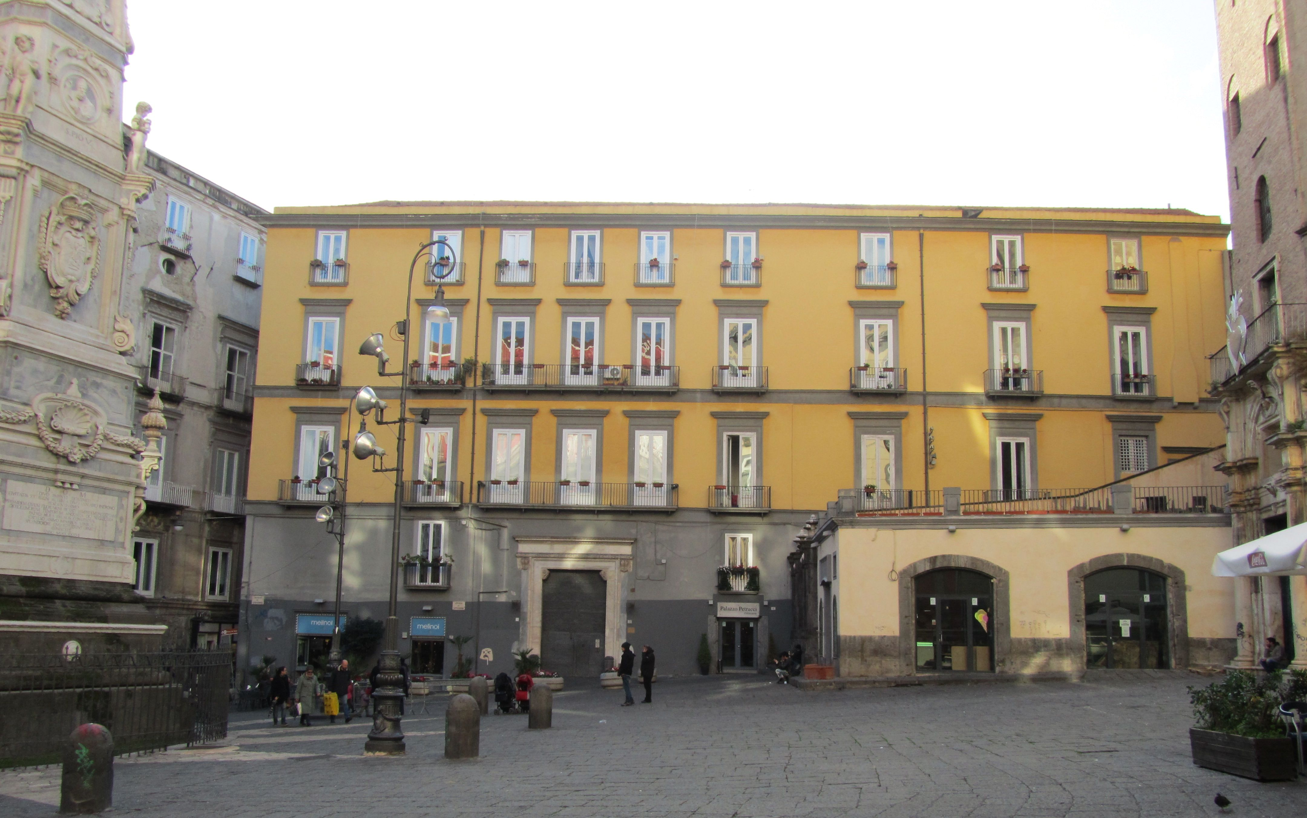 Palazzo Petrucci (Napoli)